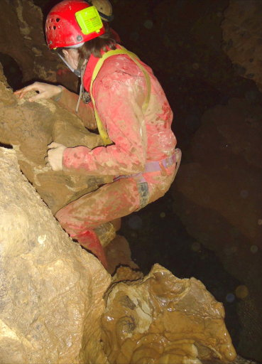 Désescalade délicate dans une grotte en spéléologie